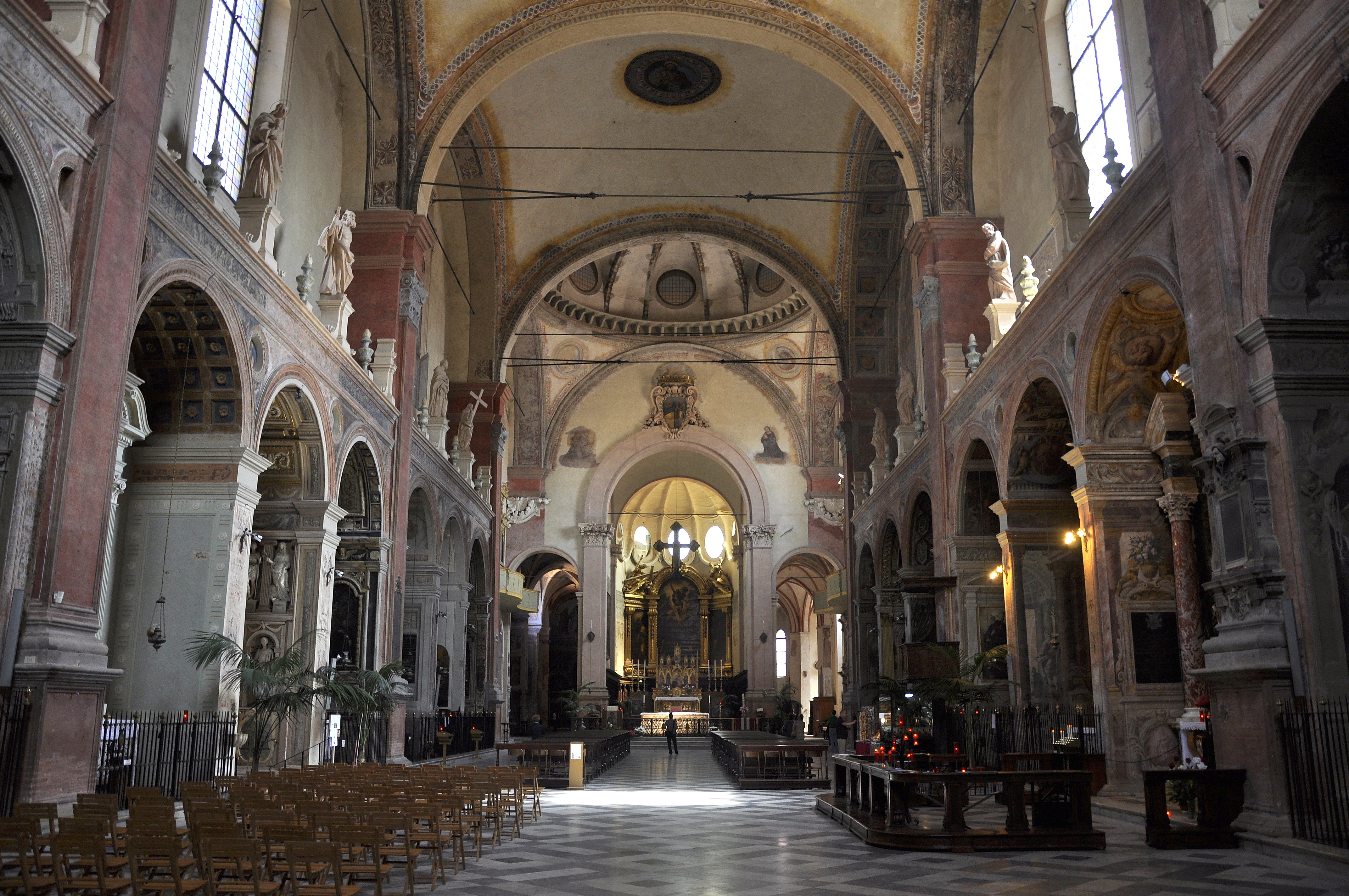 De basiliek van Sint-Jakobus de Meerdere, Bologna